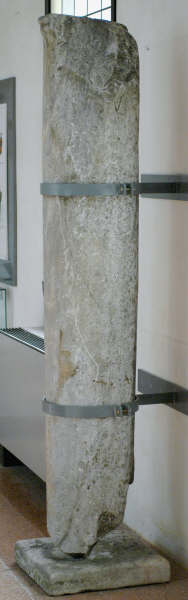 Miliario di Massenzio da Falceri